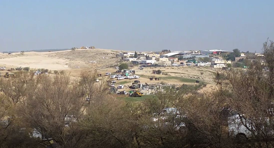 מבט ככלי על אום אל-חיראן